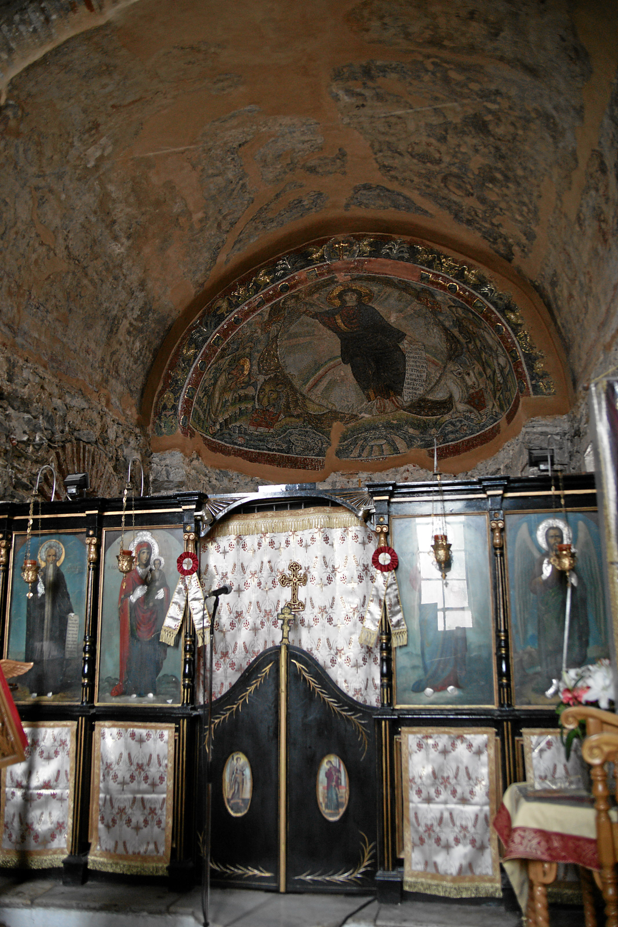 Moni Latomou, Hosios David - Kirche: Innenansicht